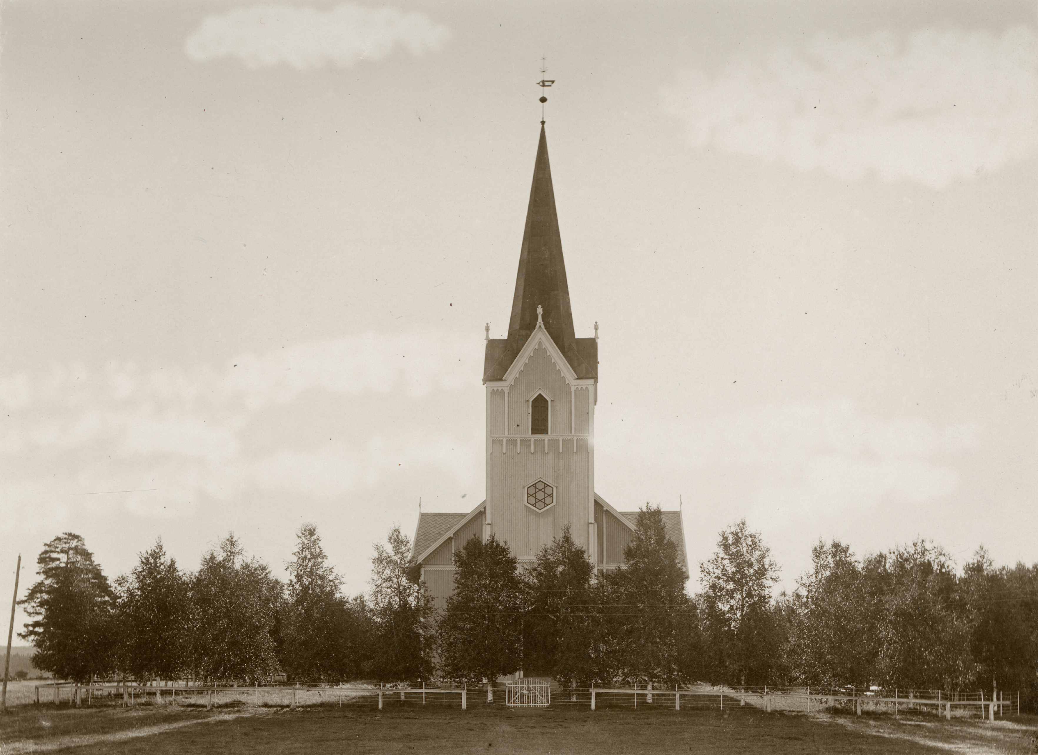 Aurskog kirke, Akershus